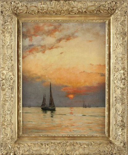 "Voilier au coucher du soleil" de Ricard Cordingley 1893 (collection particulière)